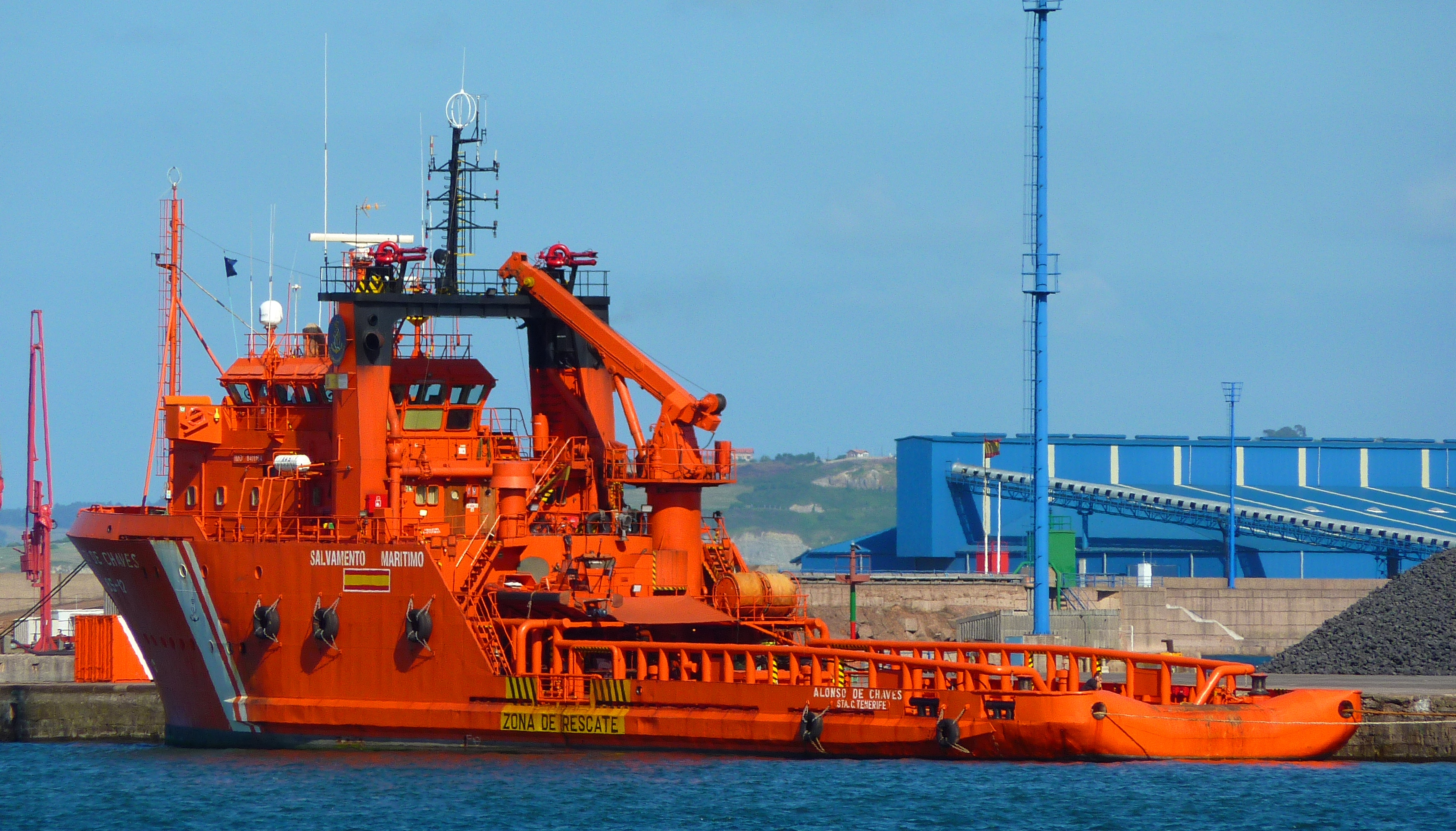 Buque remolcador de la Sociedad de Salvamento y Seguridad Marítima "Alonso de Chaves", BS-12.